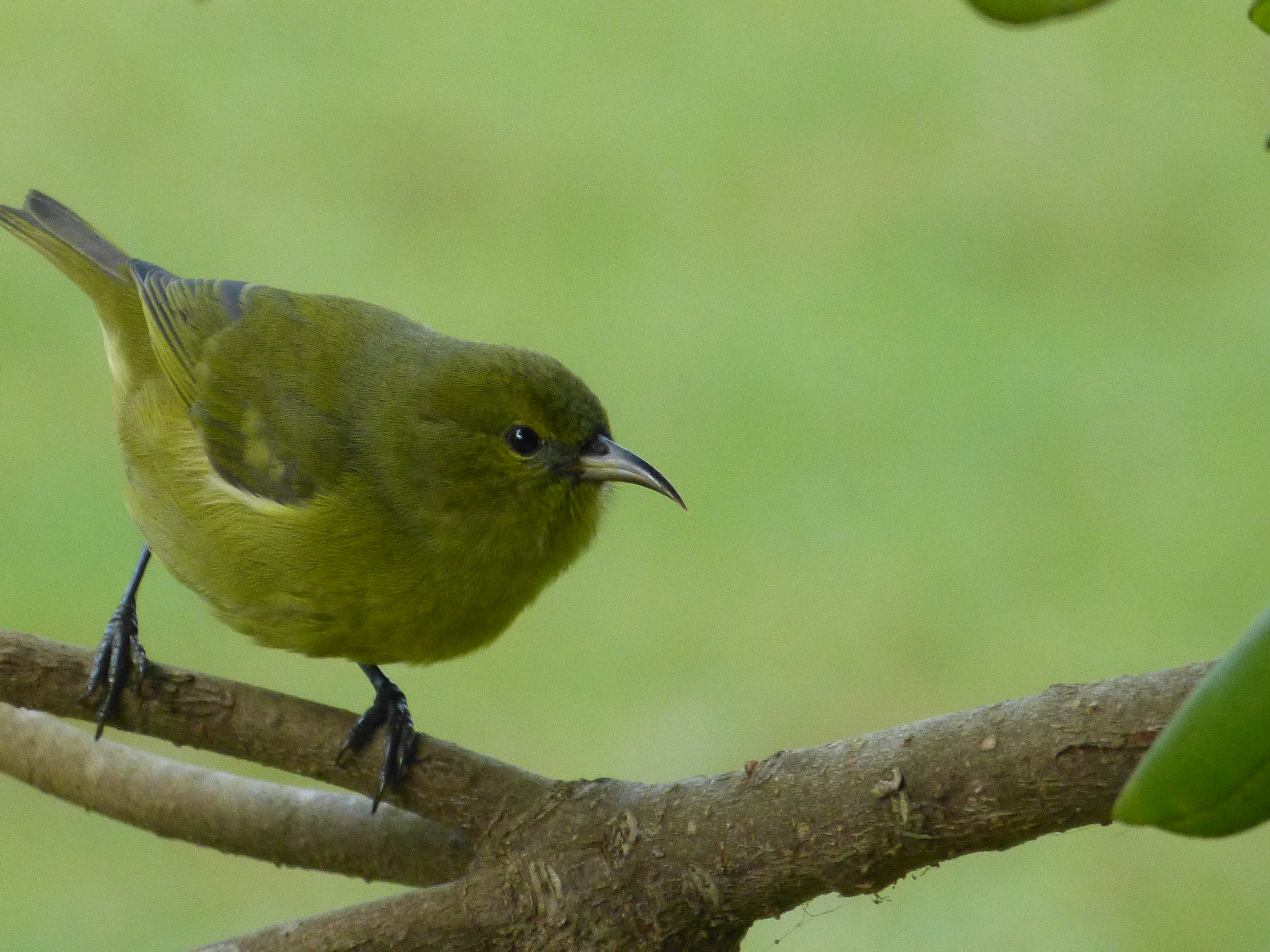 Amakihi, James Brennan Molokai